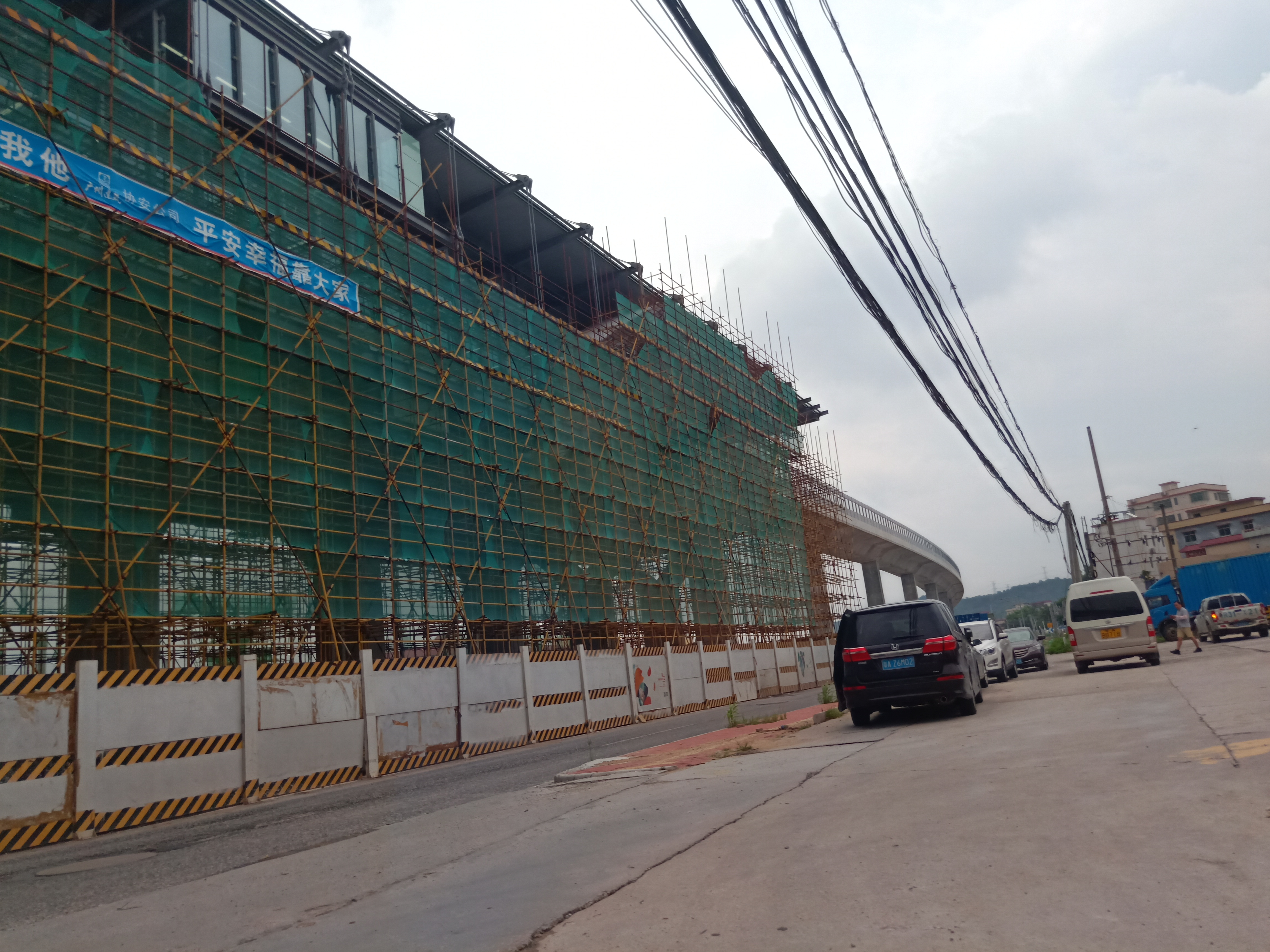 粵語: 2018年8月31號，雖然神岡站個樣基本上都見到，但出面啲棚架重未拆。